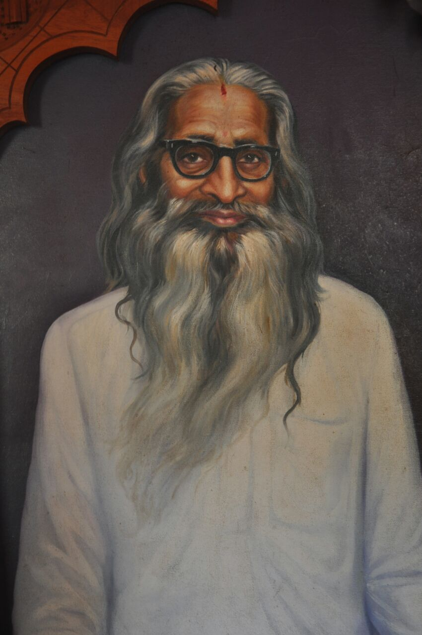 ಕನ್ನಡ: ಶ್ರೀ ಧೀರೇಂದ್ರನಾಥ ಭಟ್ಟಾಚಾರ್ಯರು